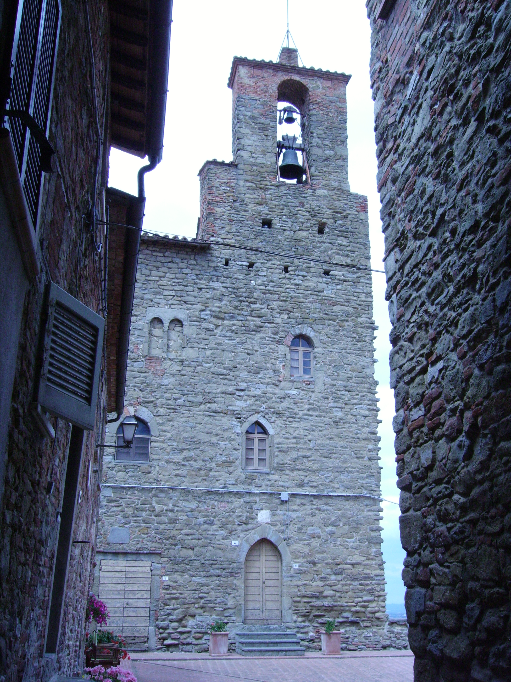 Panicale (Italy): Palazzo del Podestà